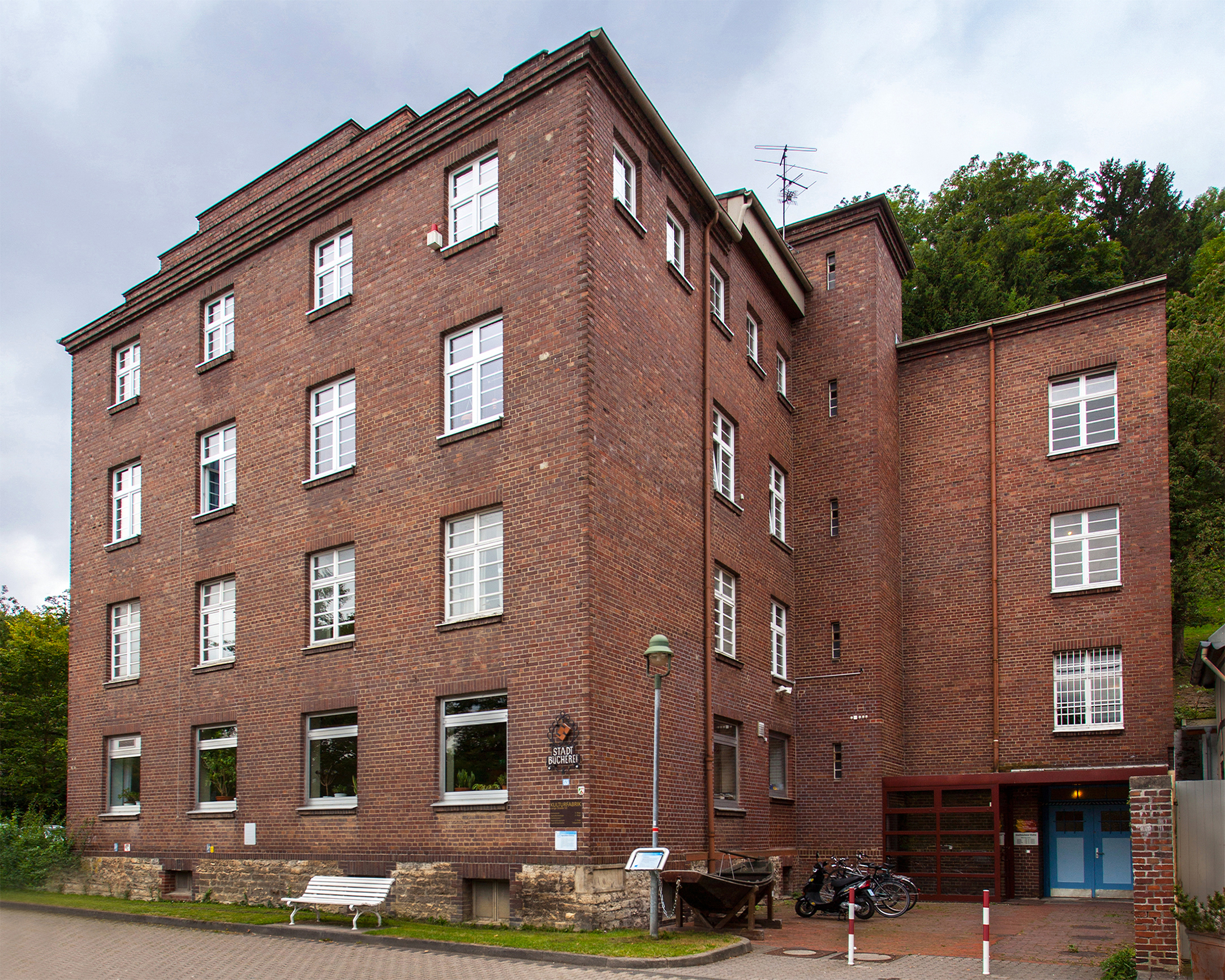 Ehemalige Zigarrenfabrik Schöning in Vlotho This is the photograph of an architectural monument. It is part of the list of cultural monuments of Vlotho, no. 52